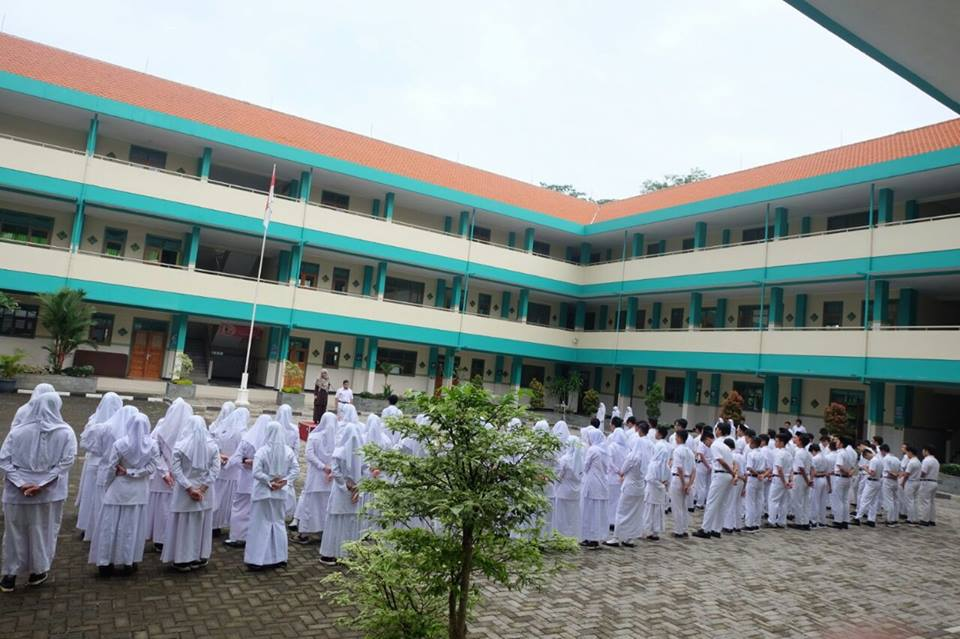 Suasana Upacara Bendera SMA Islam Al Azhar 14